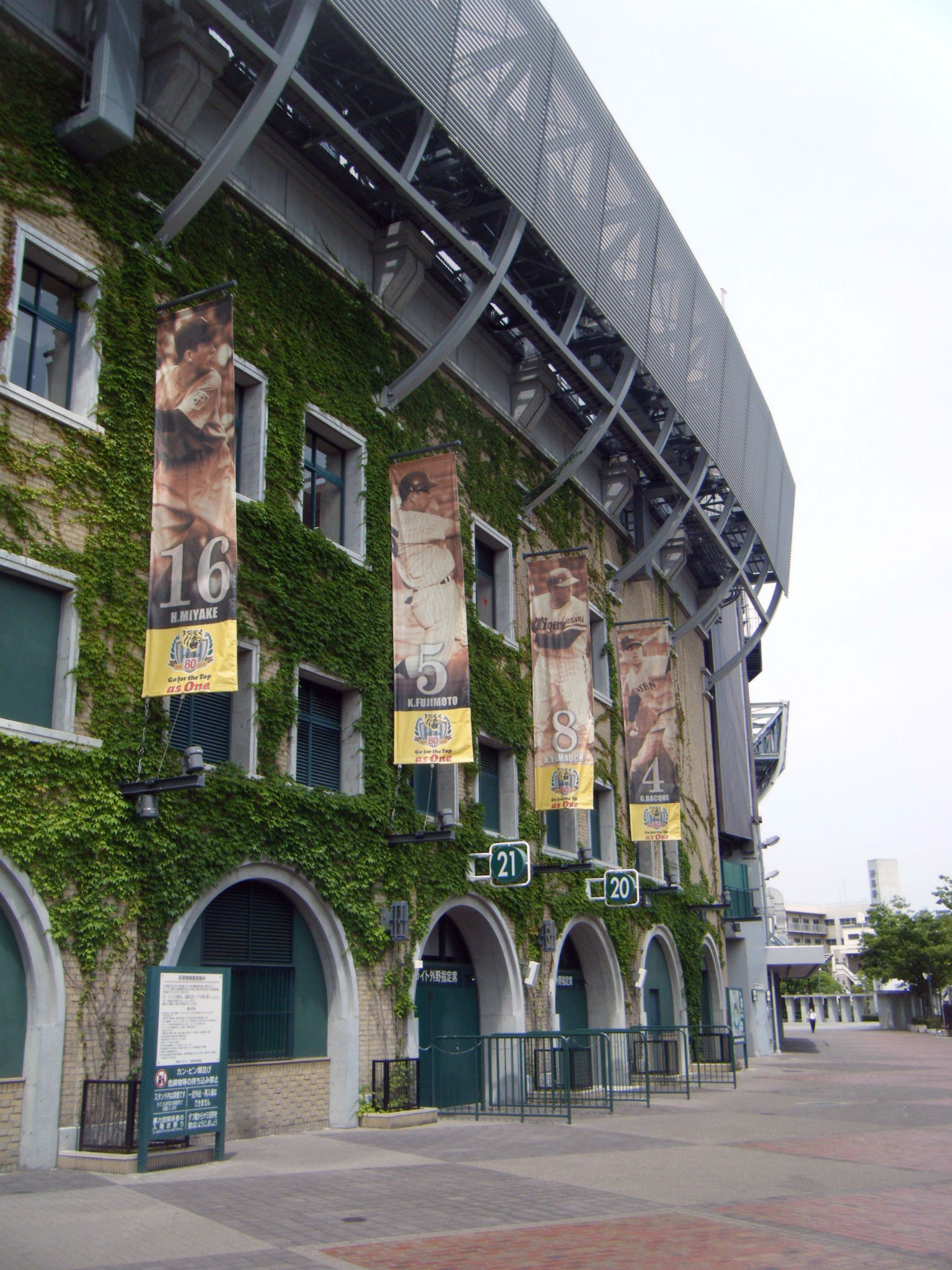 甲子園球場21号門付近の蔦。